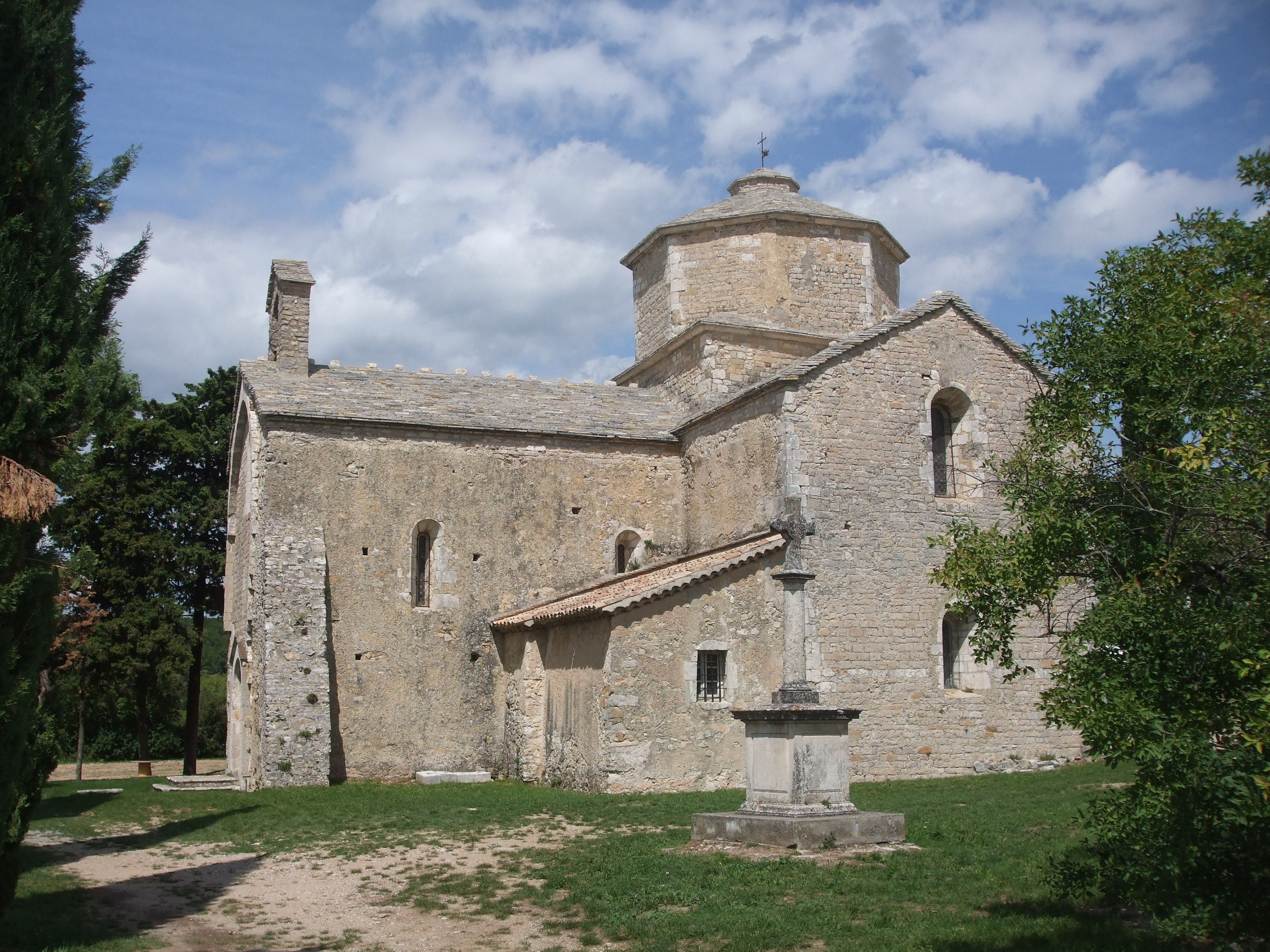 église Saint Pierre aux Liens